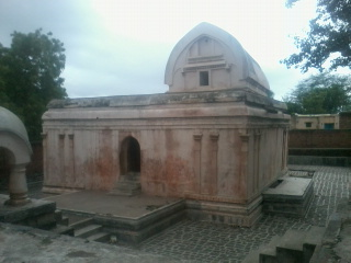 भारताच्या तेर जिल्हा उस्मानाबाद येथील त्रिविक्रम मंदिर.